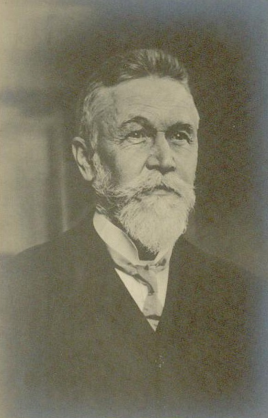 Diplomático alemán en Osorno, Chile